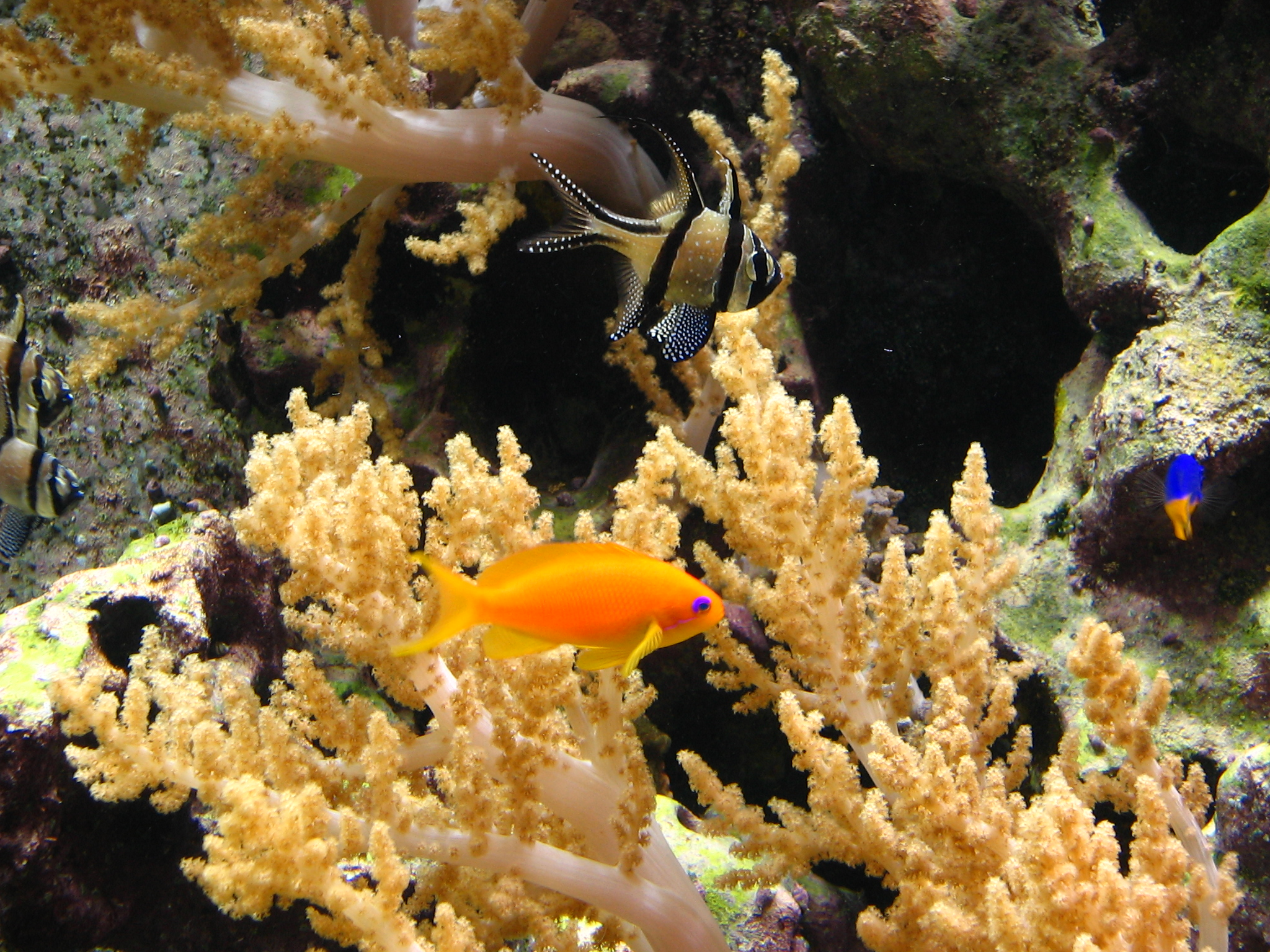 Aquazoo-Löbbecke-Museum, Düsseldorf